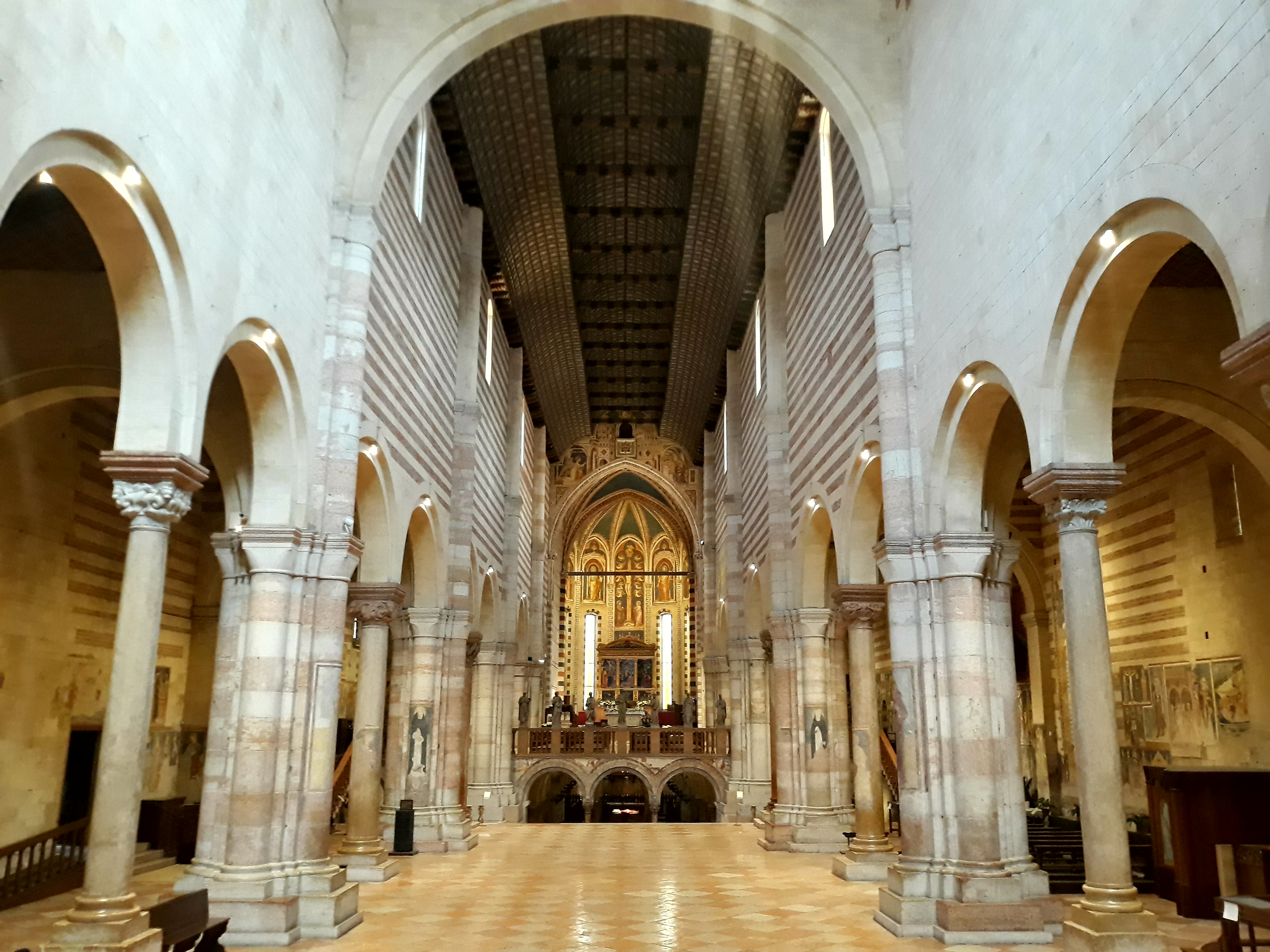 Interno della basilica di San Zeno a Verona